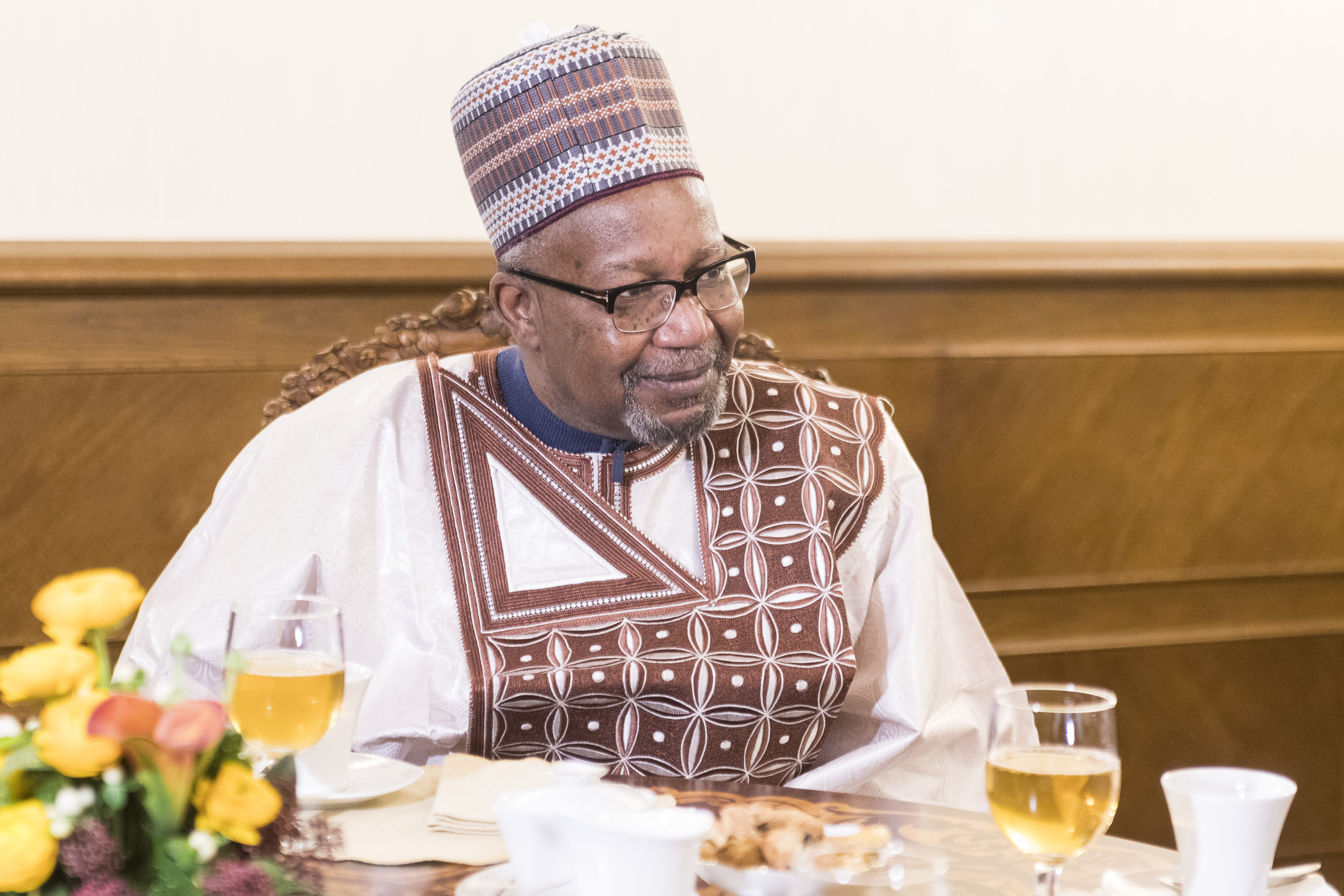 2017.gada 28.novembris. Saeimas priekšsēdētājas biedre Inese Lībiņa-Egnere tiekas ar Mali Republikas ārkārtējo un pilnvaroto vēstnieku Latvijas Republikā Tumani Džimē Djallo (Toumani Djimé Diallo). Foto: Reinis Inkēns, Saeima Izmantošanas noteikumi: saeima.lv/lv/autortiesibas